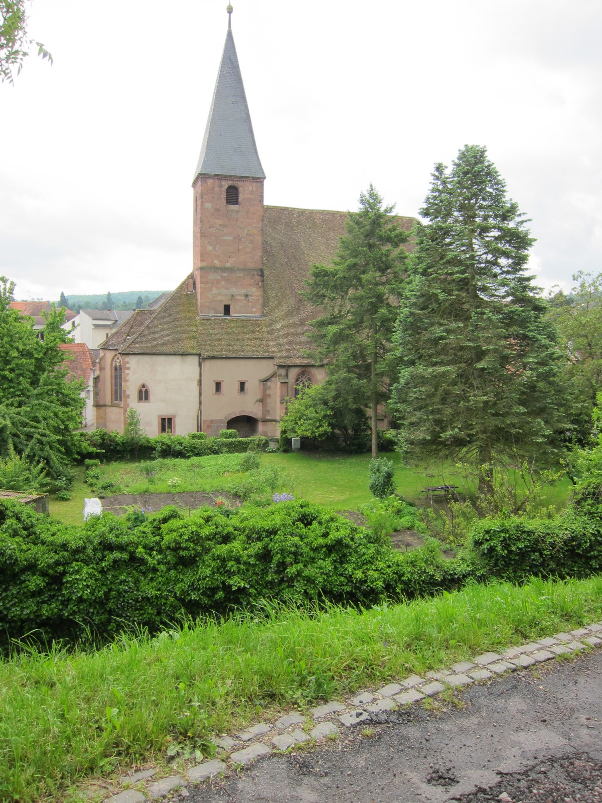 Alsace